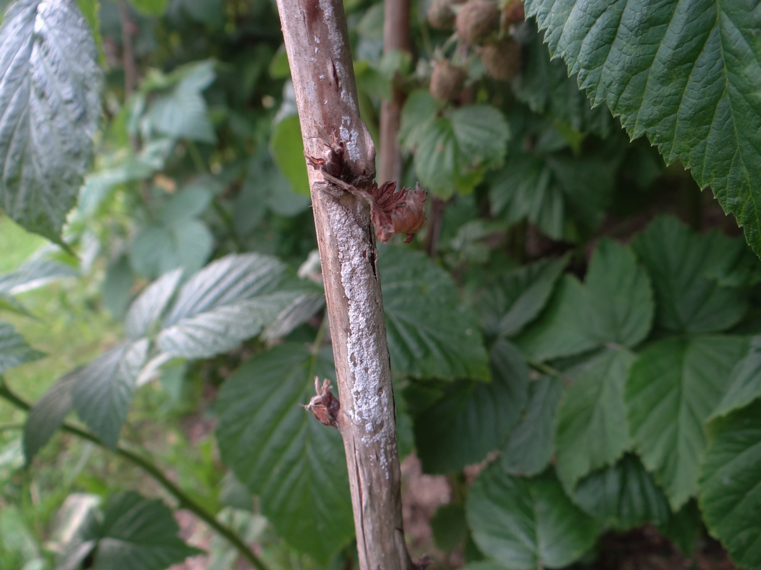 Didymella applanata on Rubus idaeus